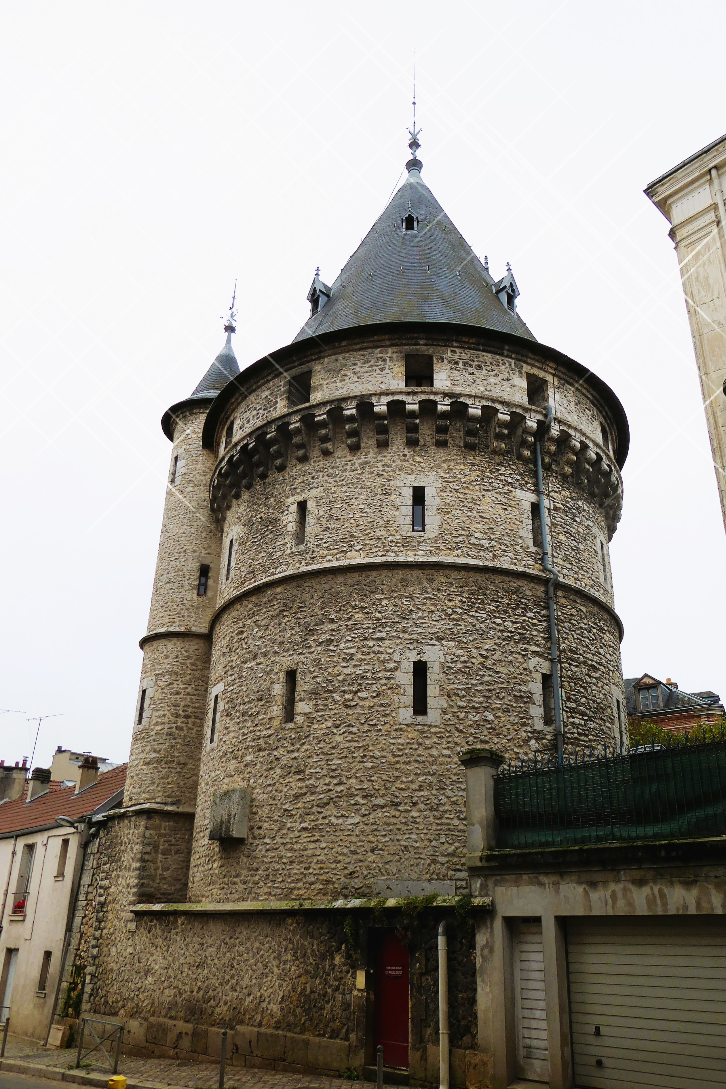 "Tour" Jehan Pocquet, ancien réservoir abritant les locaux de la SAEL, 1 rue Jehan Pocquet, Chartres, Eure-et-Loir (France).